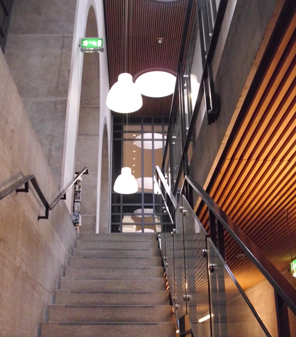 Treppenaufgang Bibliothek